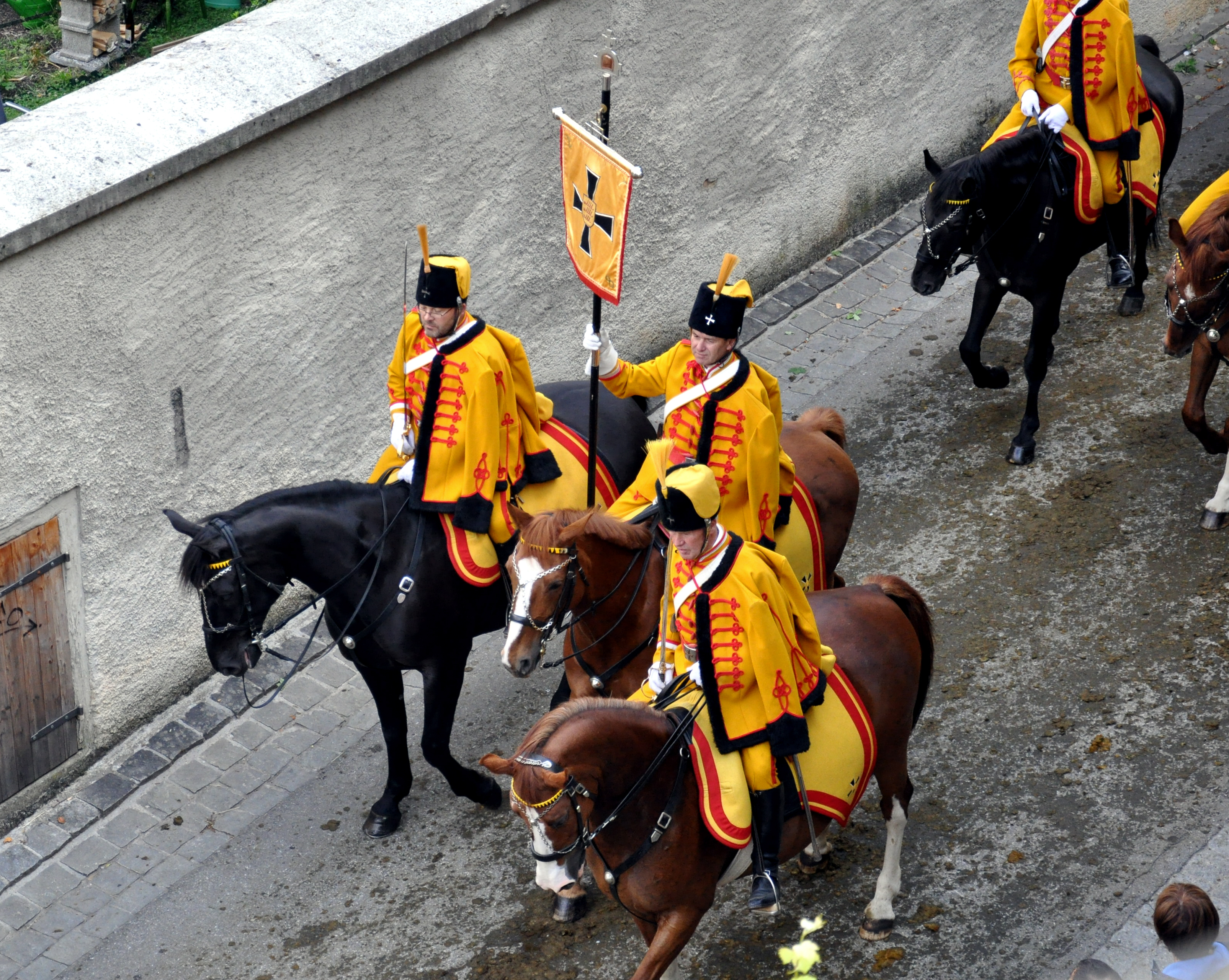 Weingarten, Blutritt 2011, Bürgergarde Altshausen „Gelbe Husaren“